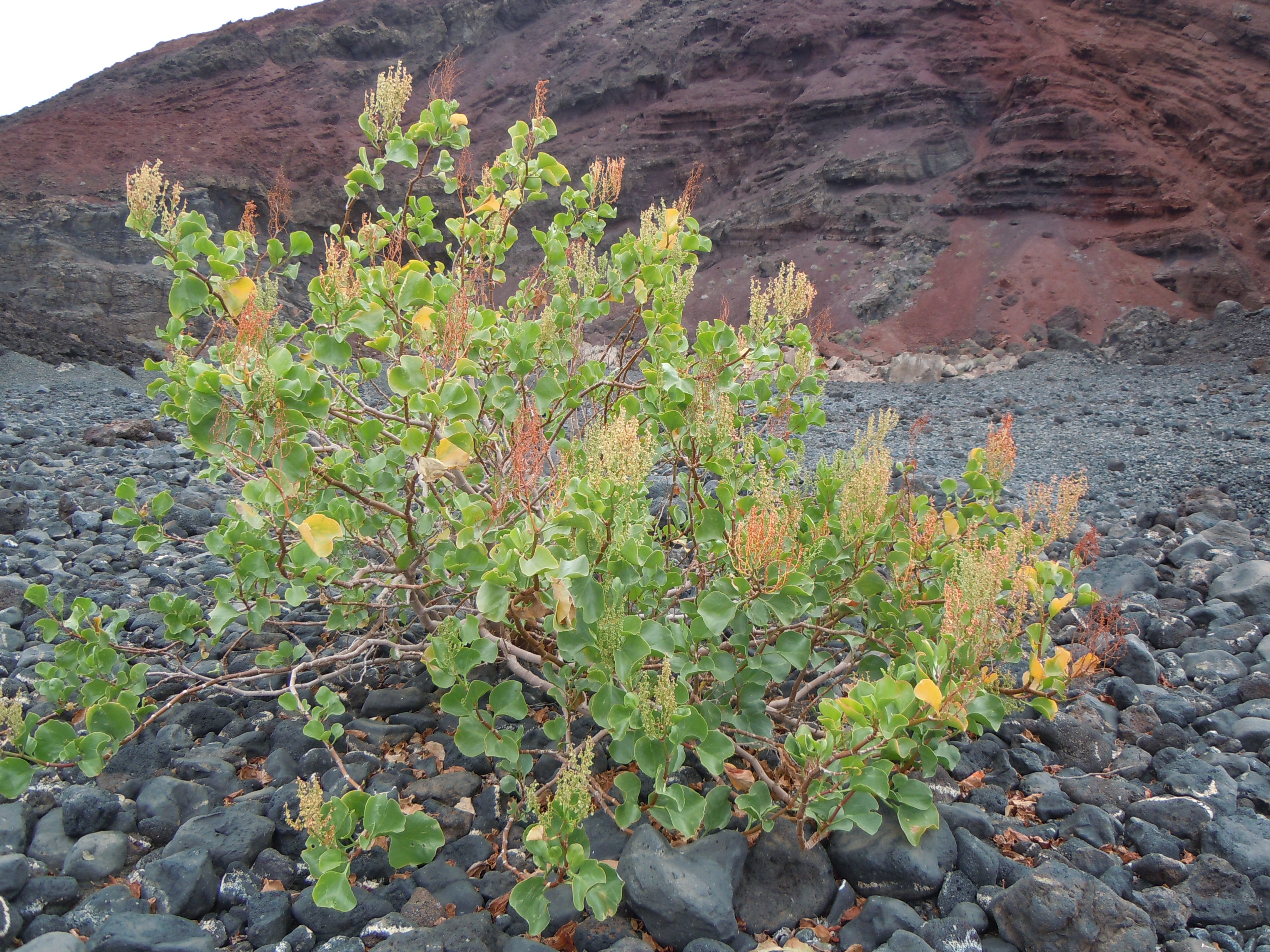 Rumex lunaria au pied de la Montana Bermeja à Lanzarote